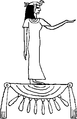 Darstellung der Göttin Meret/depiction of the goddess Meret